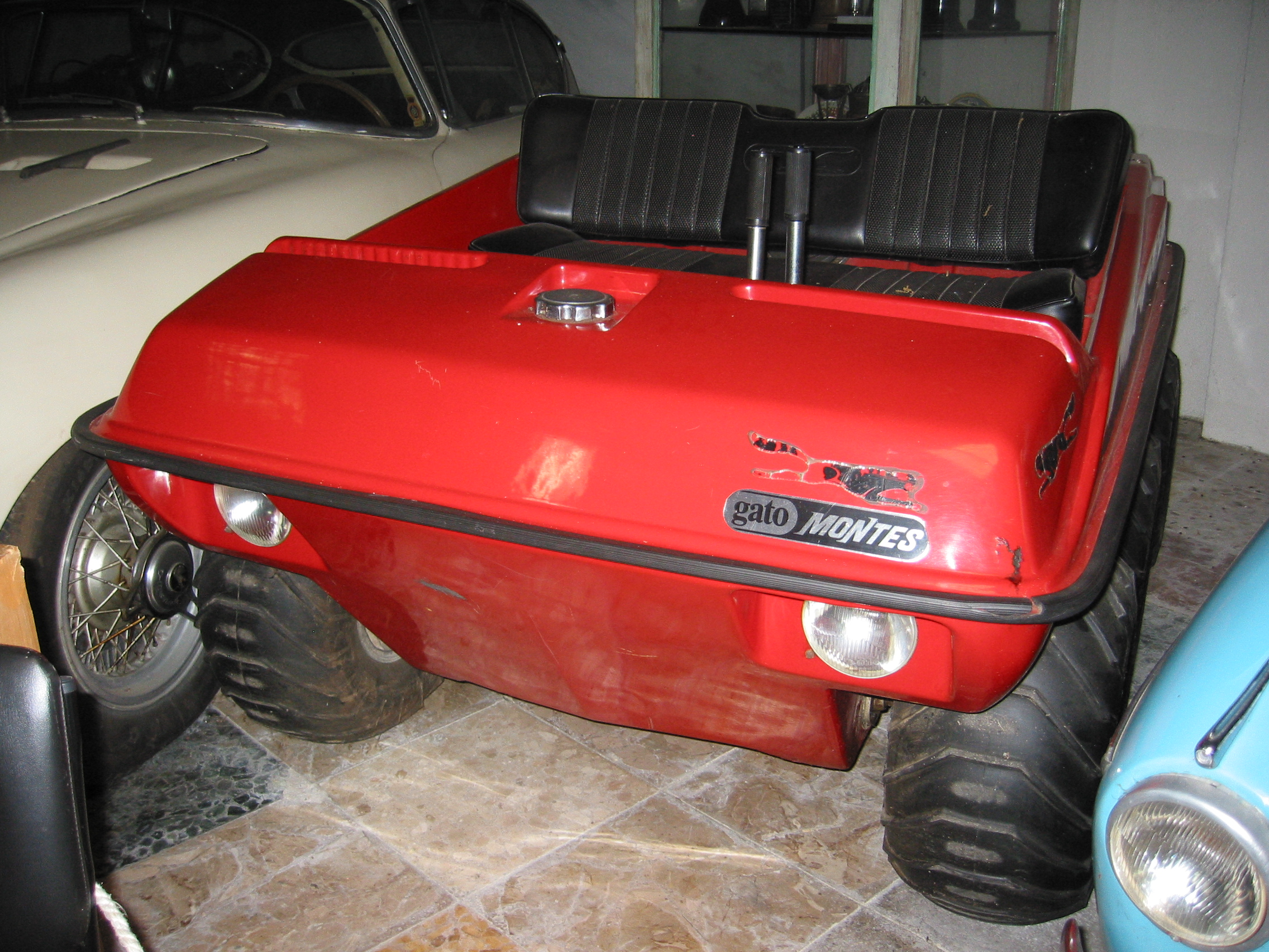 Artés Gato Montes 1971